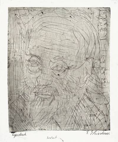 Kopf Bosshart. 1921. Radierung mit Plattenton auf gestrichenem Papier. 30,9 x 25,1 cm (38 x 29,2 cm)